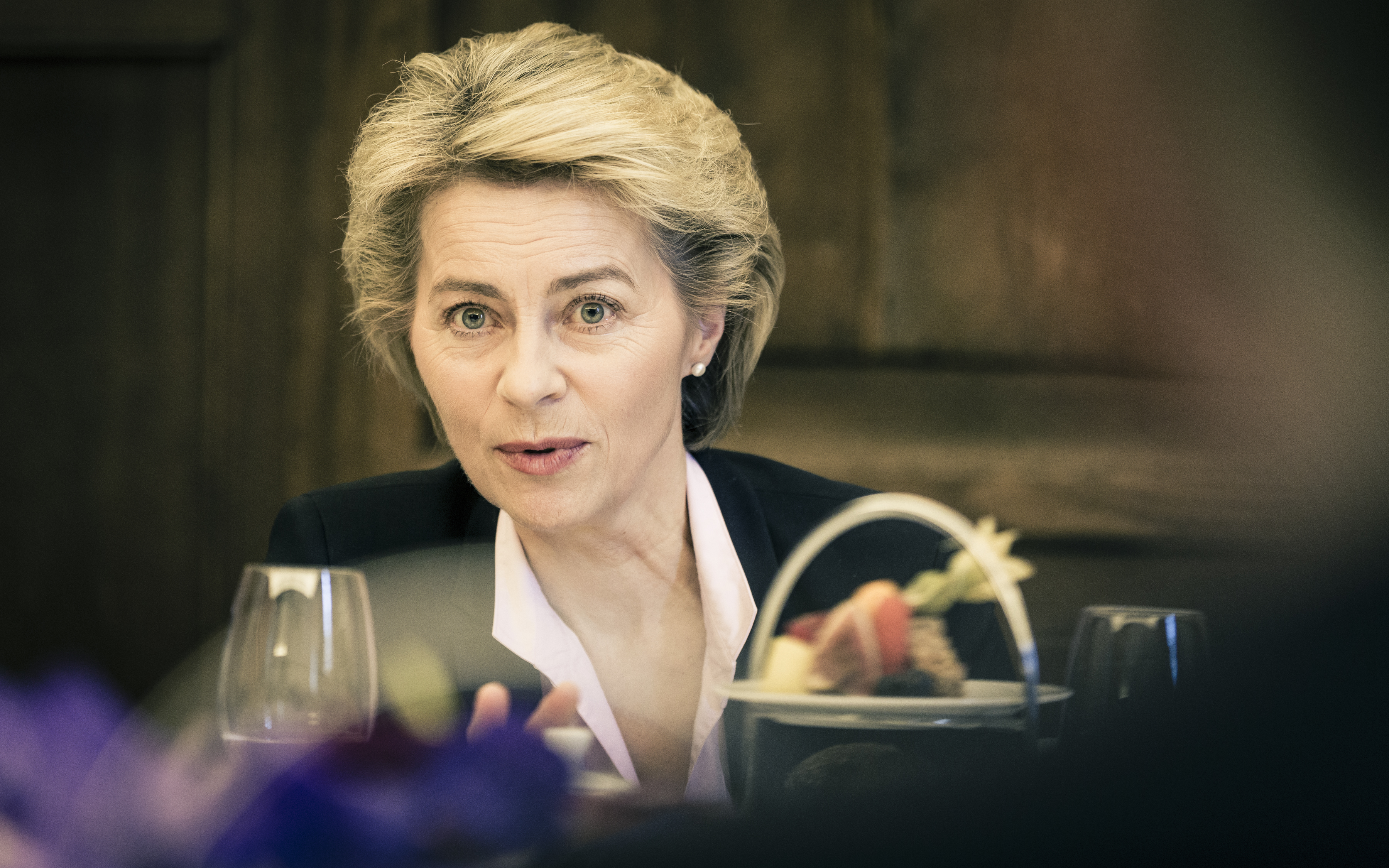 Ursula von der Leyen während der Münchner Sicherheitskonferenz 2017